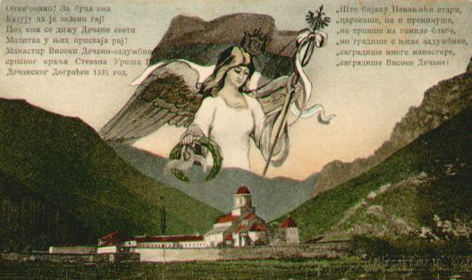 Манастир Високи Дечани, разгледница из 1912. године